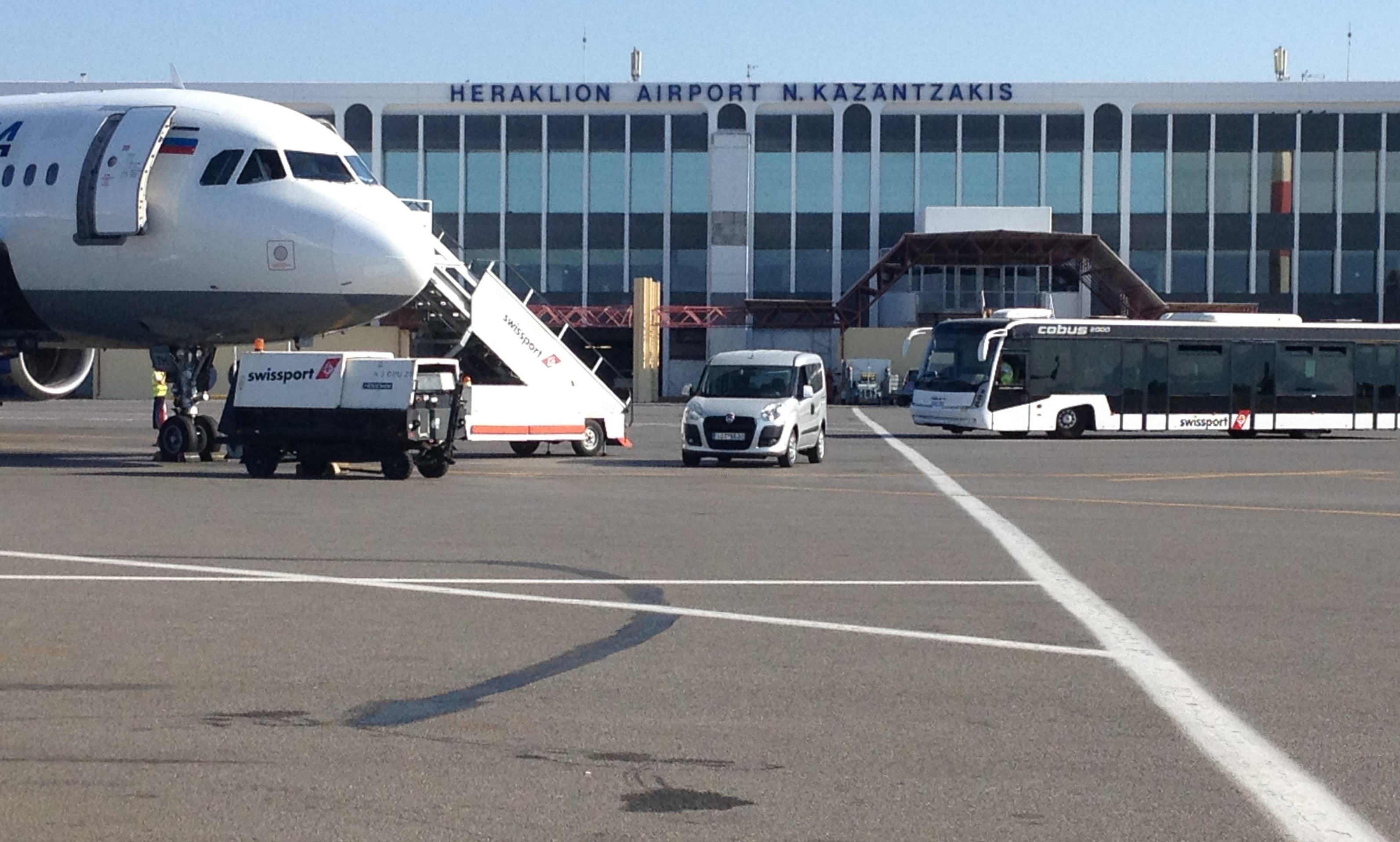 Aéroport d'Héraklion en Crète.